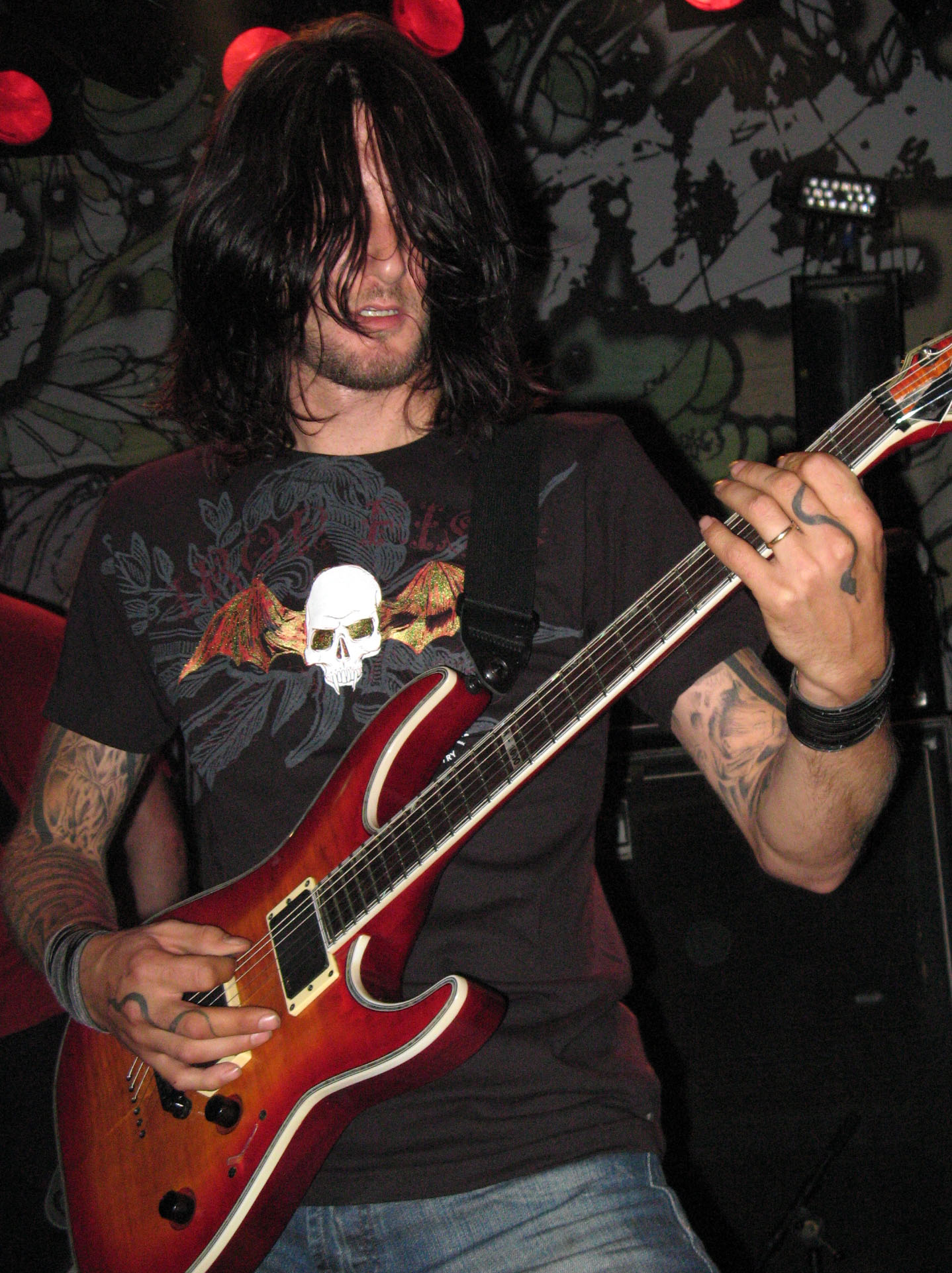 Kris Norris of Darkest Hour in Melkweg